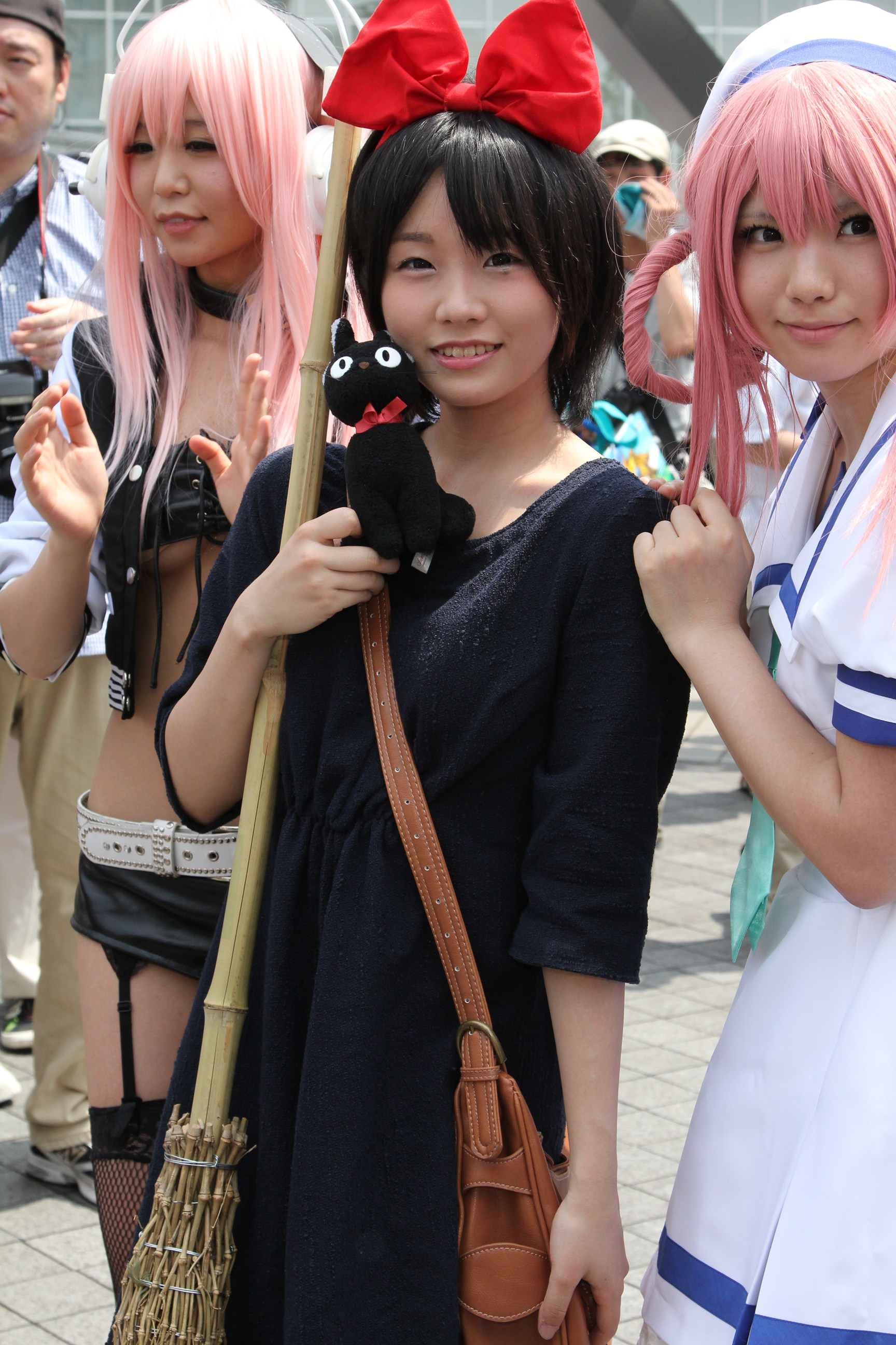 2012年8月10日に行われたコミックマーケット82のパナシェ！みたいです。左から五木あきら、くろねこ、えなこ。